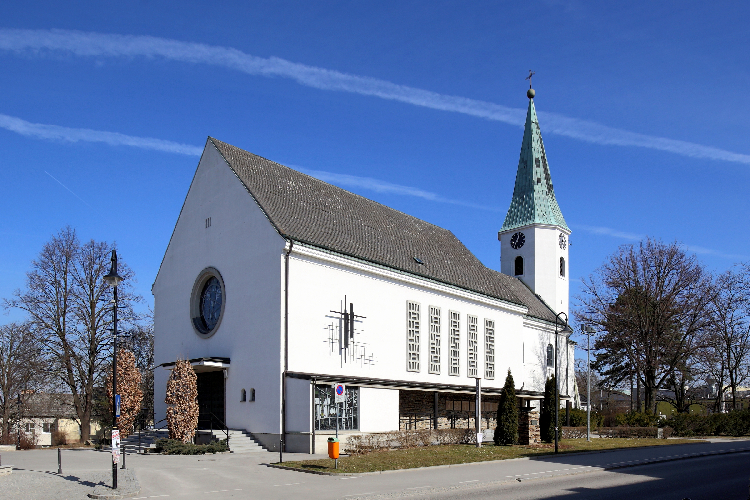 Südwestansicht der katholischen Pfarrkirche hll. Schutzengel in der niederösterreichischen Stadt Gänserndorf. Ein im Kern spätromanischer Bau (um 1300) mit gotischem Chor aus dem 14. Jahrhundert. Nach schweren Brandschäden 1683 und 1695 wurde die Kirche barockisiert. 1961 erfolgte nach Plänen von Ernst Arthofer und Karl Burian eine dem heutigen Erscheinungsbild bestimmende Erweiterung Richtung Westen.